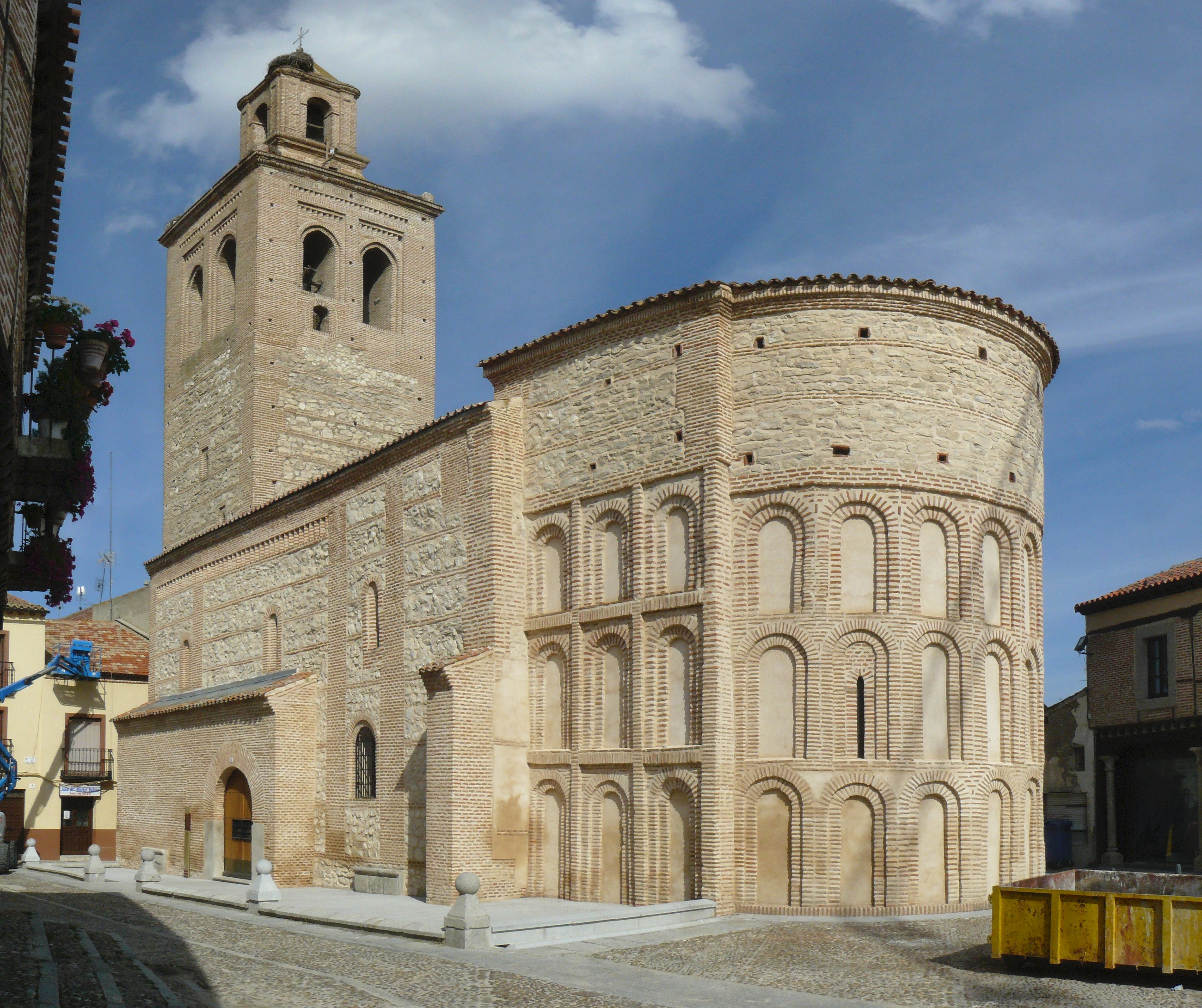 Iglesia de Santa María la Mayor, Arévalo, provincia de Ávila, románico mudéjar.